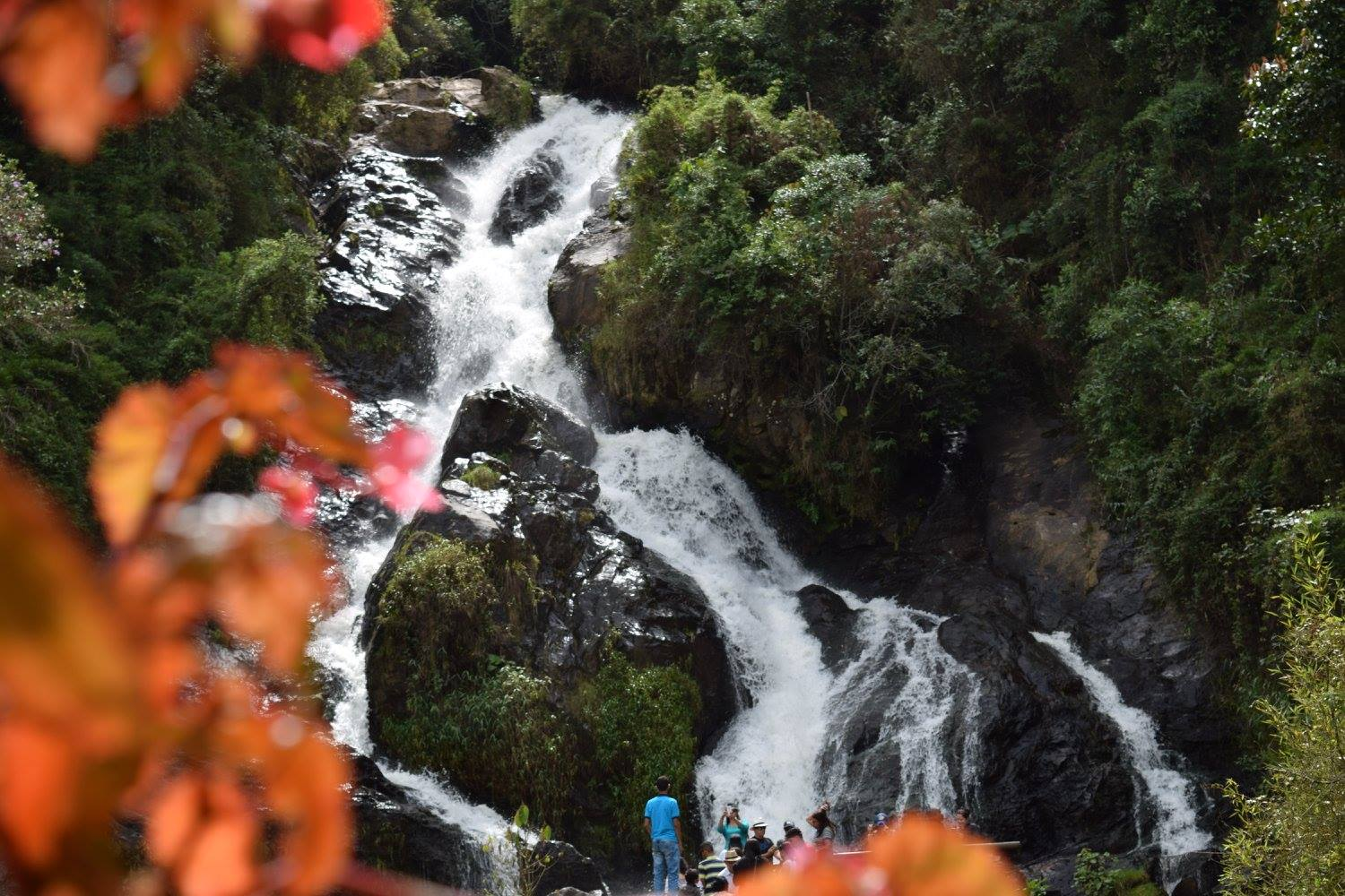 Esta fotografía fue tomada en el municipio colombiano con código 05607.